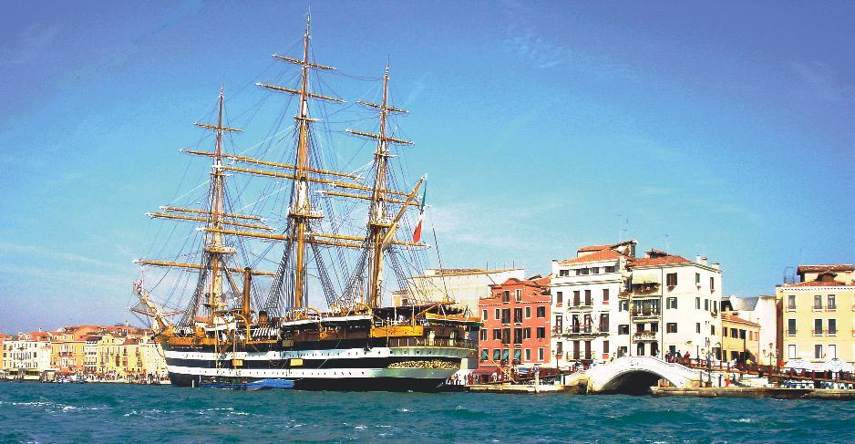 Veleiro Amerigo Vespucci